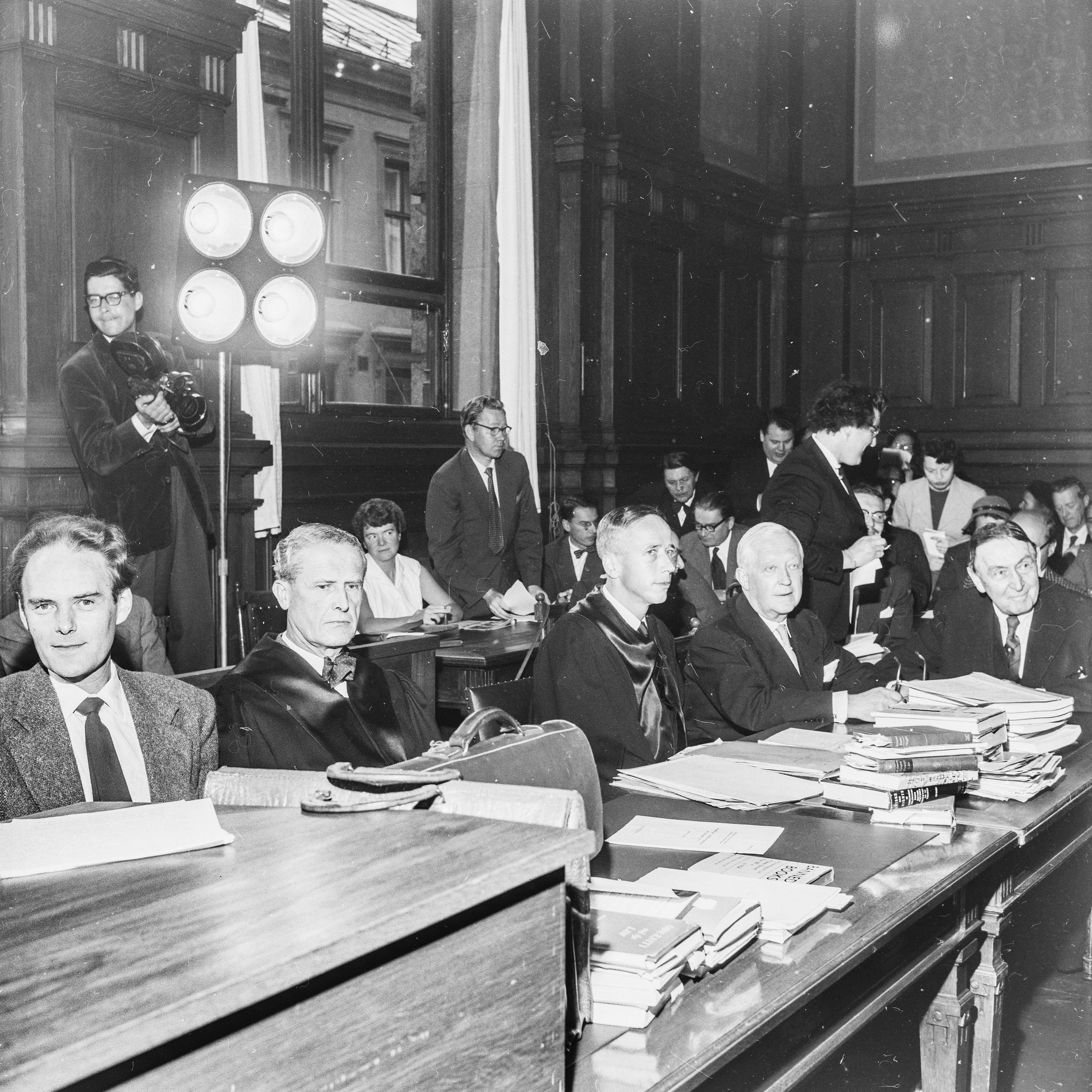 Foto overført fra Riksarkivets album «Rettsaken mot Agnar Mykle og Harald Grieg» på Flickr med følgende beskrivelse: Etter utgivelsen av Sangen om den røde rubin i 1956 ble Agnar Mykle og direktøren i Gyldendal, Harald Grieg, tiltalt etter straffelovens § 211 nr.1b, for utgivelse av utuktige skrifter. Det ble ført straffesak både mot dem og mot boka. Etter dom i Oslo byrett 10. oktober 1957 ble de tiltalte frikjent på grunn av rettsvillfarelse. Boka ble derimot gjort ulovlig og restopplaget inndratt. Det ble slått fast at romanen var utuktig. Boka og satsen til boka skulle etter ordre fra Riksadvokaten øyeblikkelig beslaglegges hos forlaget og i alle landets bokhandler. Dommen ble anket og opphevet av Høyesterett 9. mai 1958. Disse bildene stammer fra Billedbladet NÅ sin dekning av saken. Behandling av ankesak i Høyesterett 9. mai 1958 i forbindelse med utgivelsen av Sangen om den røde rubin. Fotograf: Fjørtoft, Bjørn, Billedbladet NÅ, Riksarkivet (RA/PA-0797/U/Ue/L0064/0012)